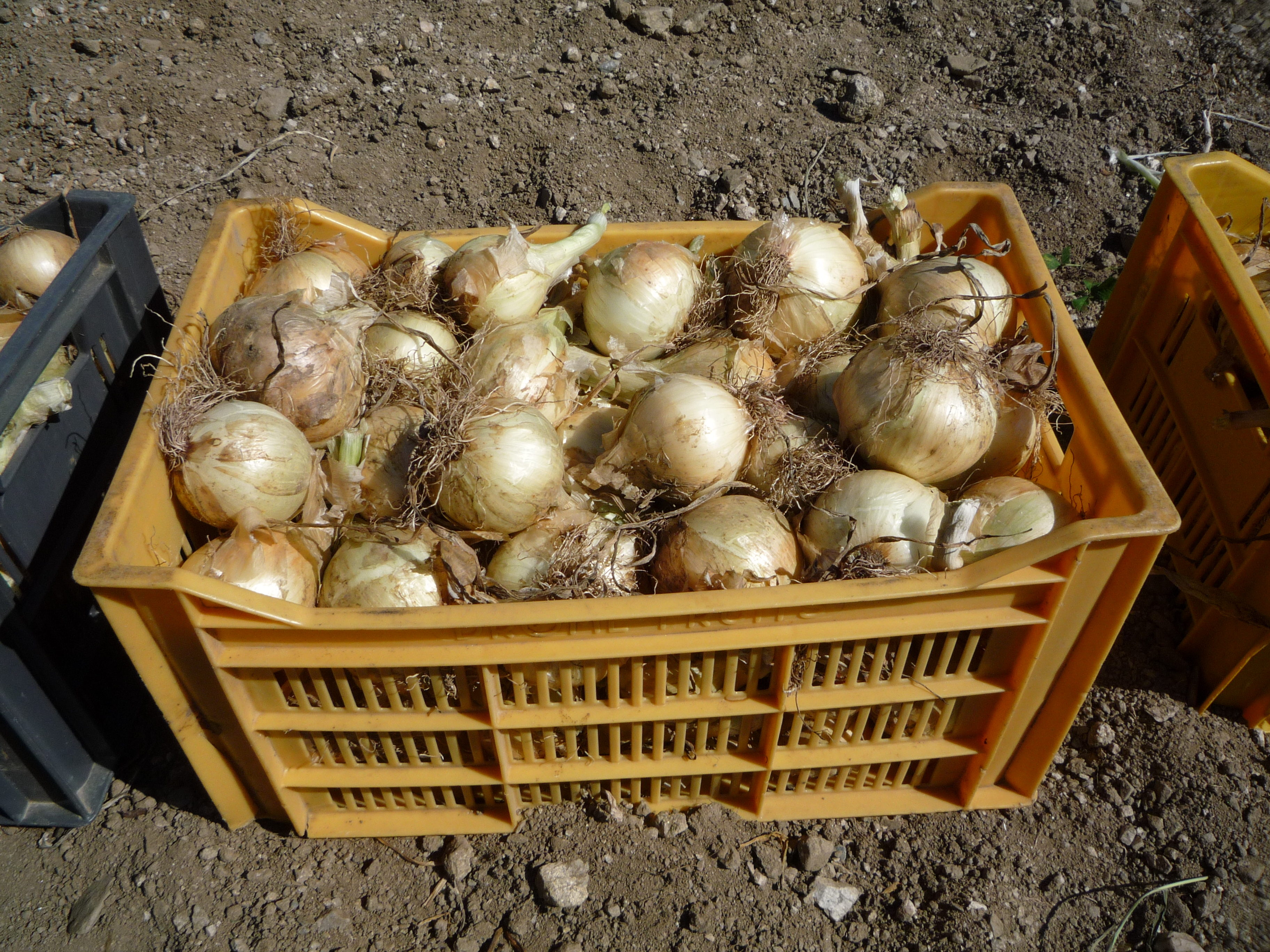 L'arrachage de l'Oignon Doux des Cévennes